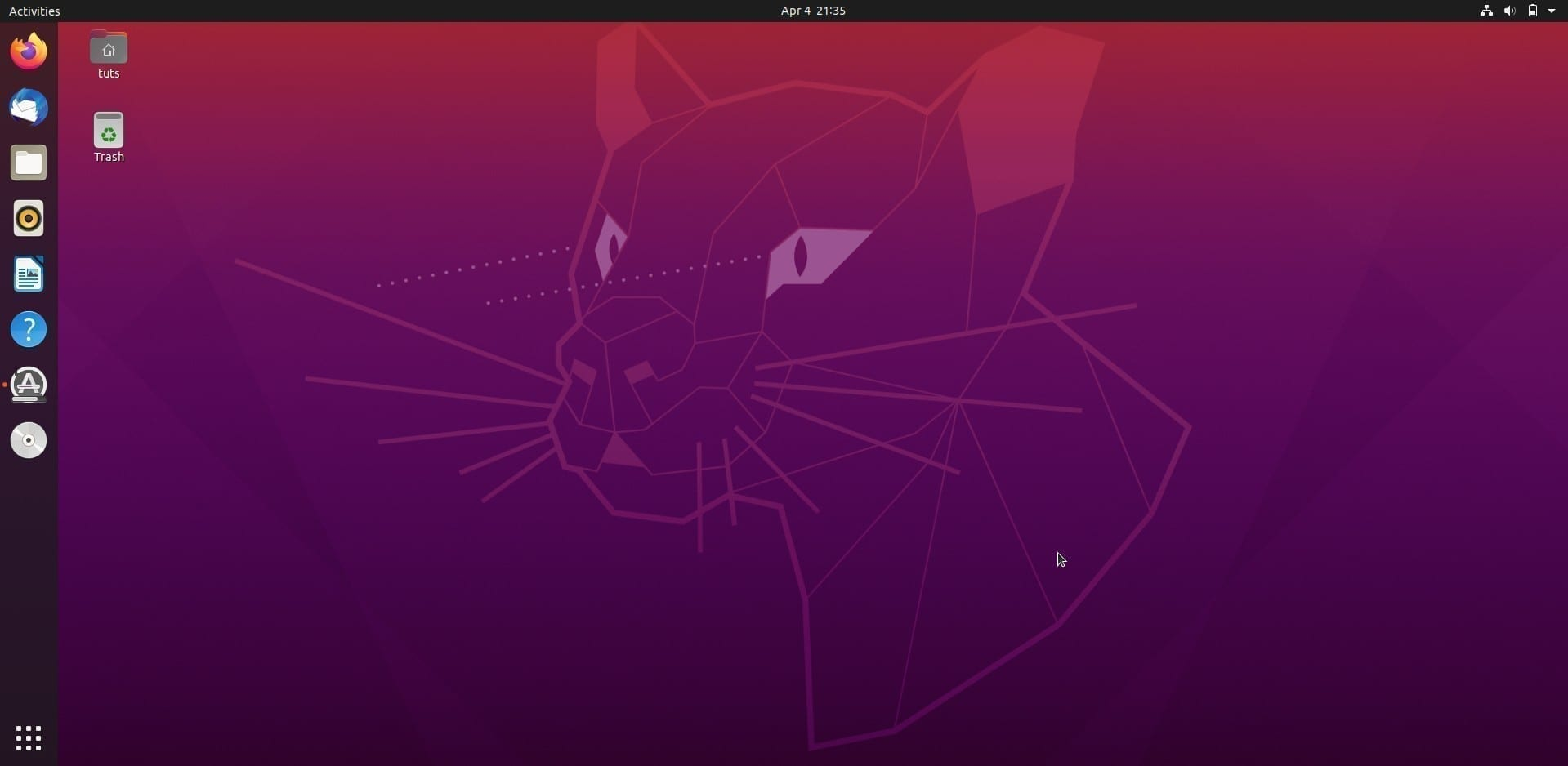 Bureau d'ubuntu 20.04 GNOME déveloper par Canonical